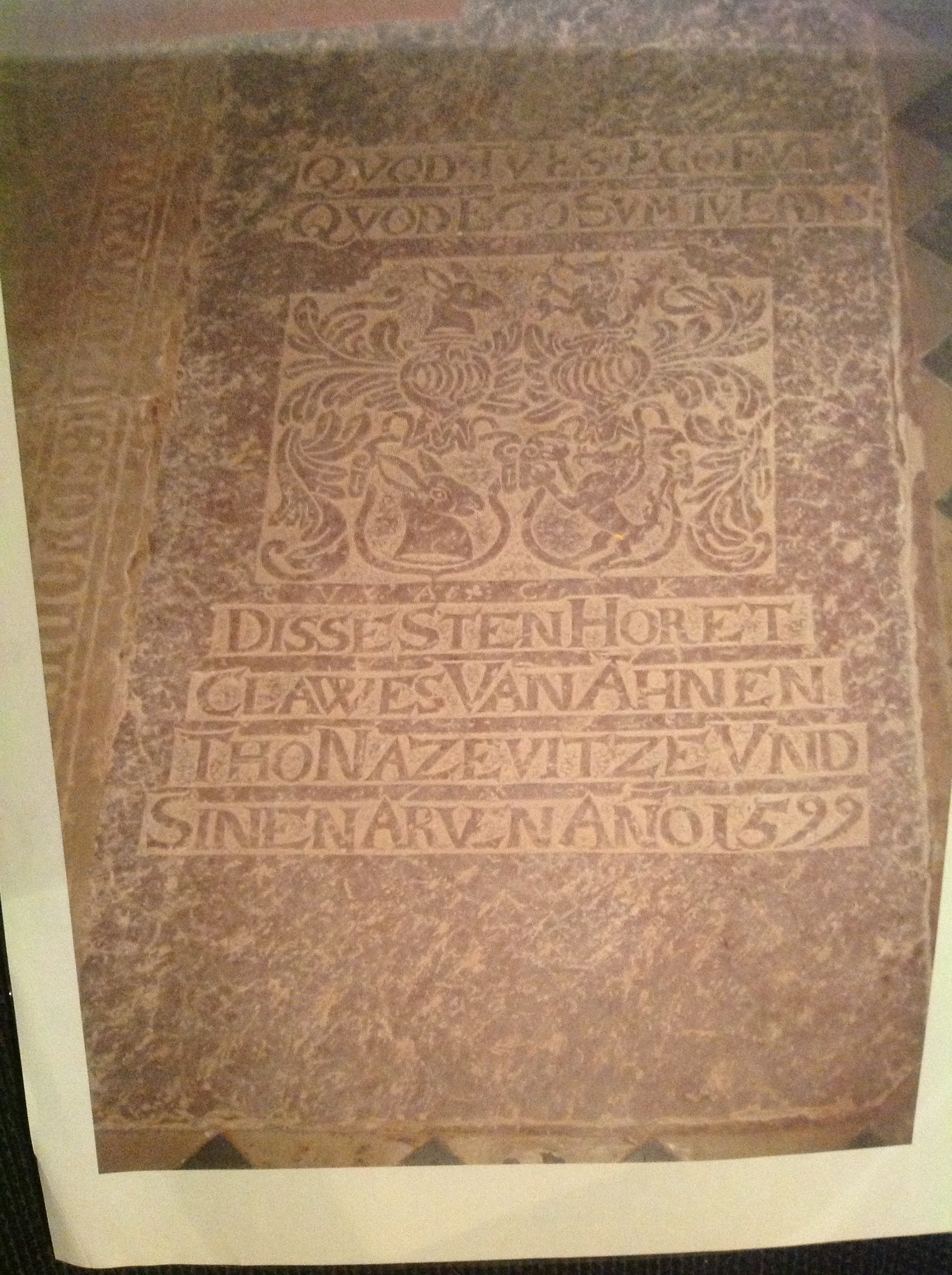 DISSE STEN HORET CLAWES VAN AHNEN THO NAZEVITZE VND SINEN ARVEN ANO 1599